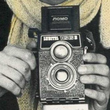 lubitel camera; zelf gemaakte foto